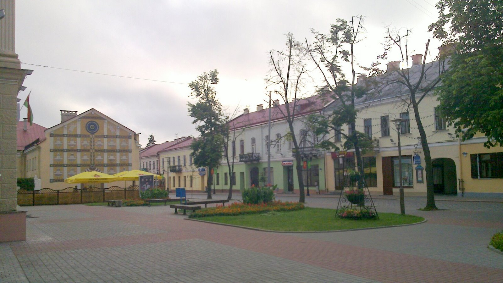 Улица Советская